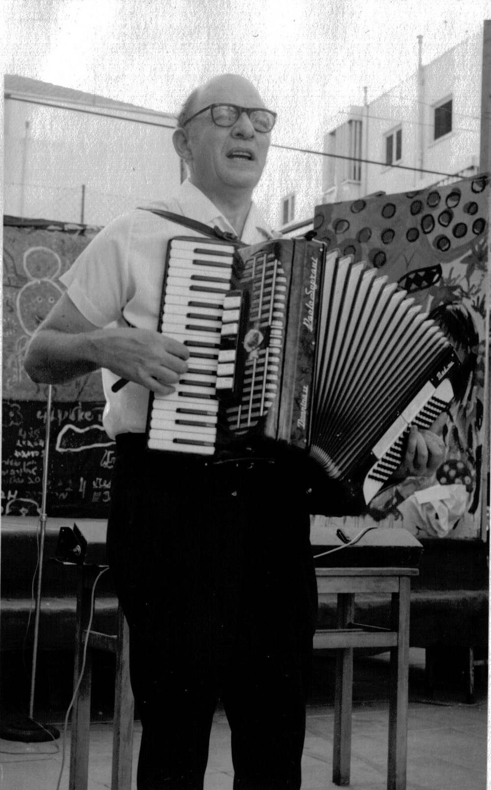 מאיר נוי (נוימן) היה מוזיקאי ישראלי, מלחין, חוקר הזמר העברי ומורה למוזיקה. מאיר נוי מנגן באקורדיון. במסיבה בבית הספר א.ד. גורדון בו לימד